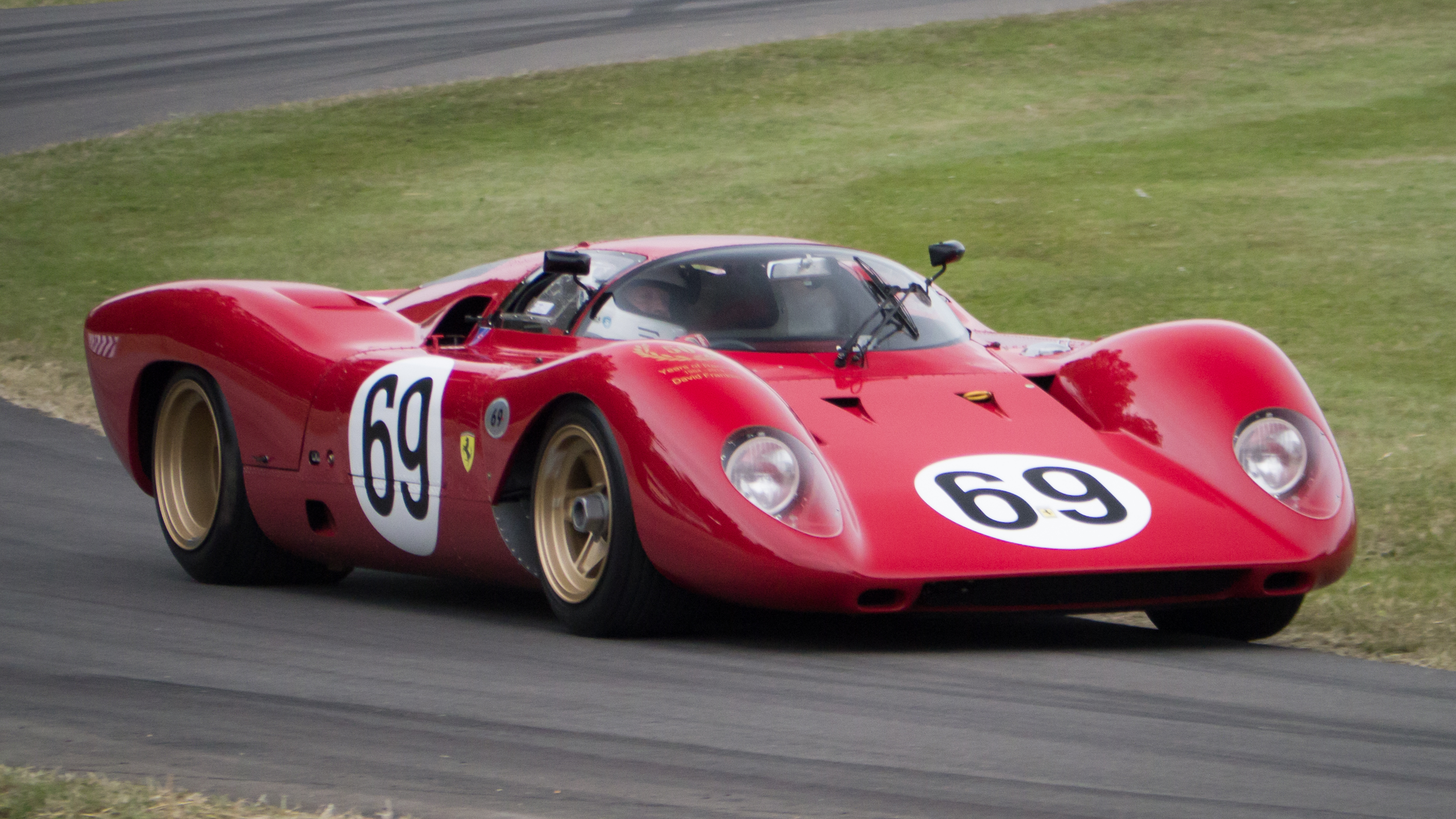 1969 Ferrari 312 P